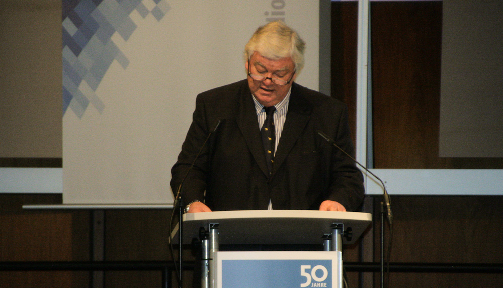 Bodo Hombach Foto: Per Bergmann